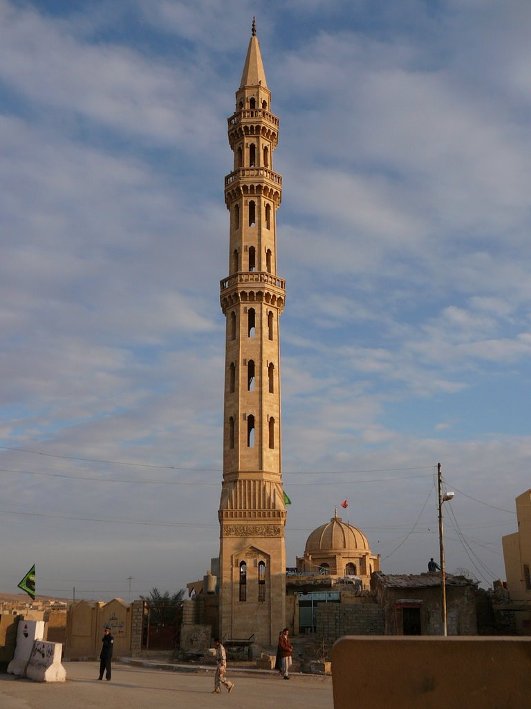 تۆرکجه: تلعفر بازار جامع سی